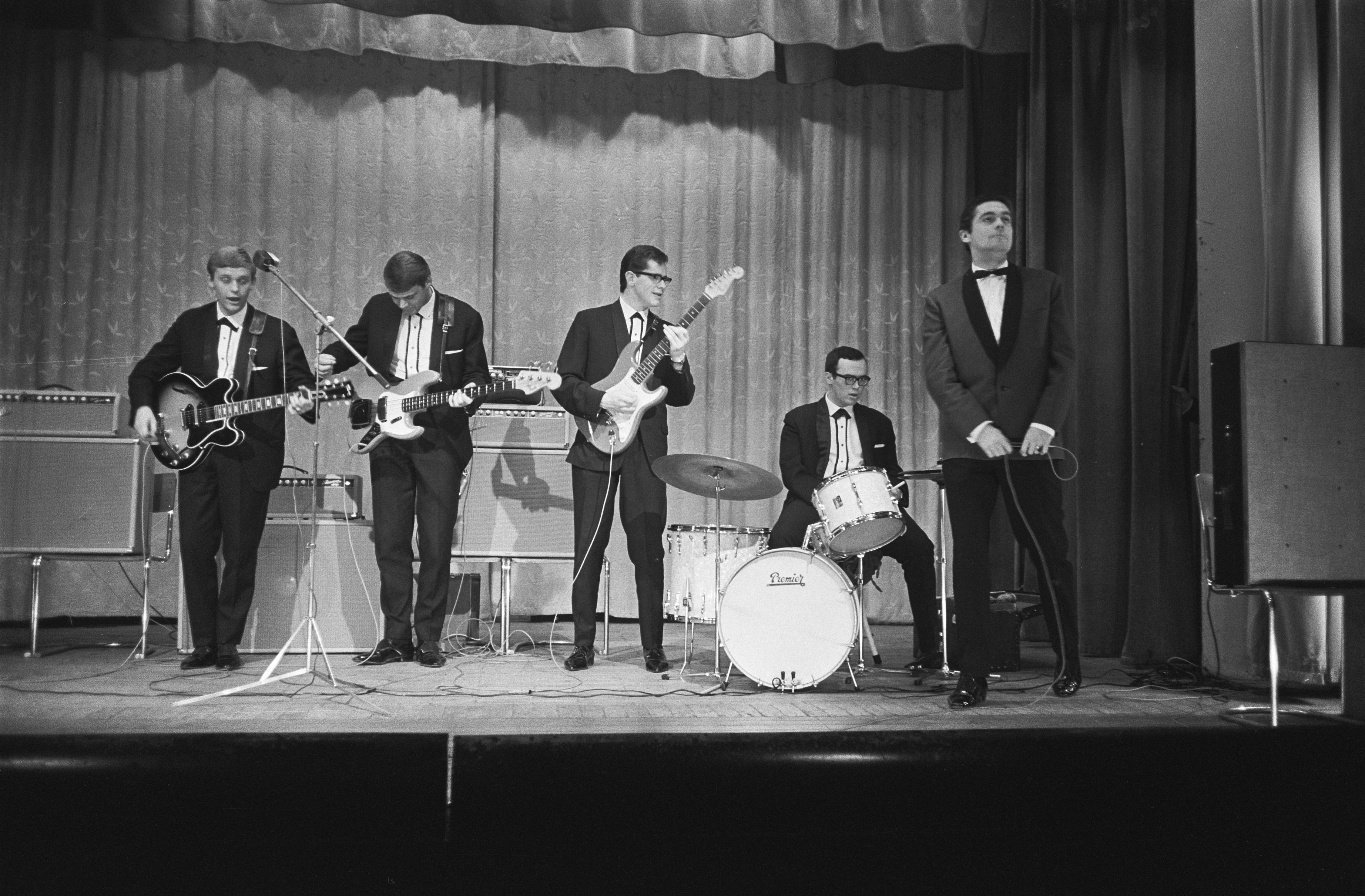 Collectie / Archief : Fotocollectie Anefo Reportage / Serie : [ onbekend ] Beschrijving : Optreden van Johnny Lion en de Jumping Jewels Datum : 20 januari 1964 Trefwoorden : muziek, popgroepen, zangers Persoonsnaam : Johnny Lion, Jumping Jewels Fotograaf : Walta, Winfried / Anefo Auteursrechthebbende : Nationaal Archief Materiaalsoort : Negatief (zwart/wit) Nummer archiefinventaris : bekijk toegang 2.24.01.05 Bestanddeelnummer : 915-9683 Reacties Geplaatst door Geertje op 21 september 2014 - 22:16. leden van The Jumping Jewels zijn: Hans van Eijck, Kees Kranenburg jr., Joop Oonk, Tjibbe Veeloo